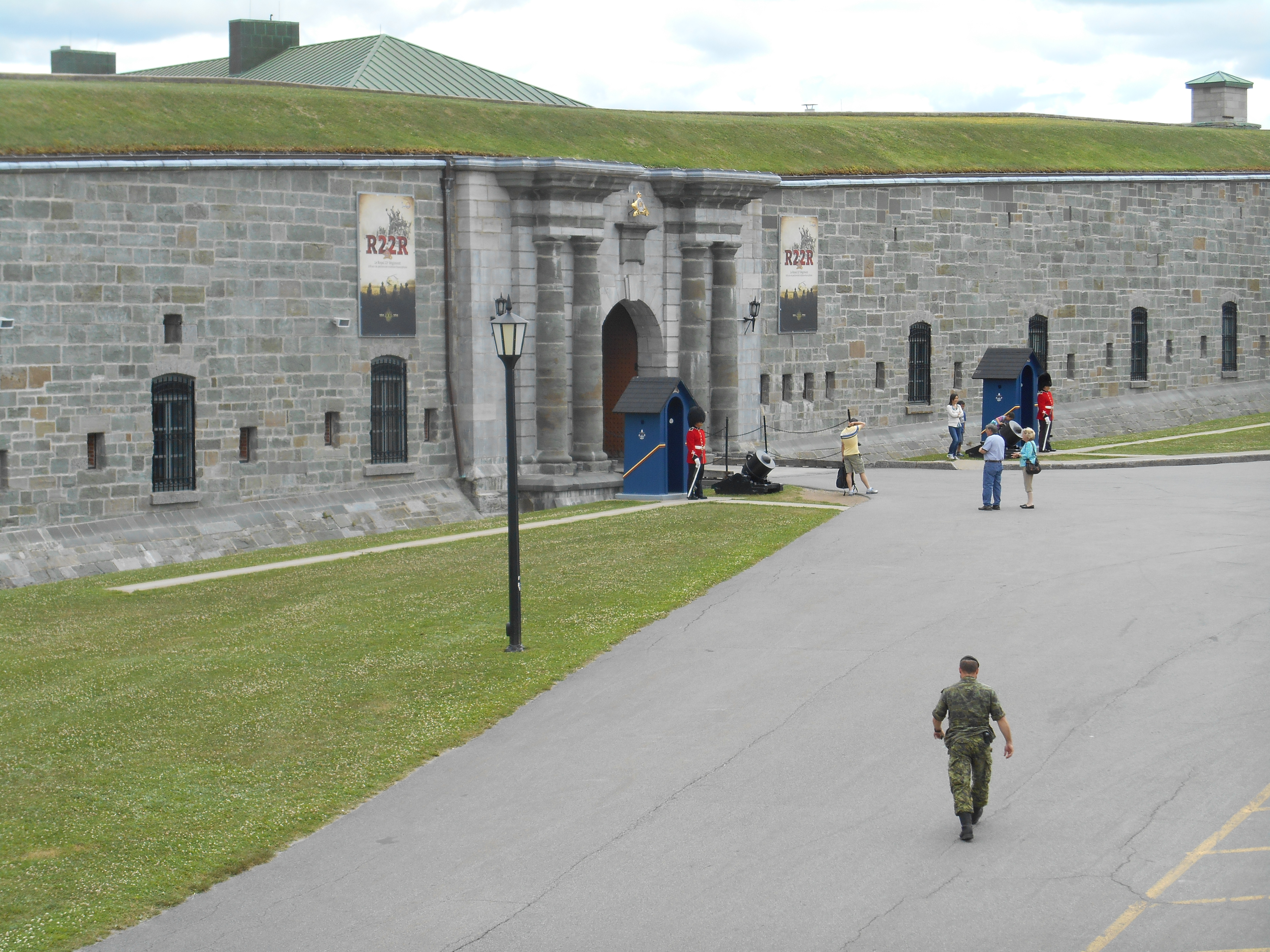 Citadelle de Québec